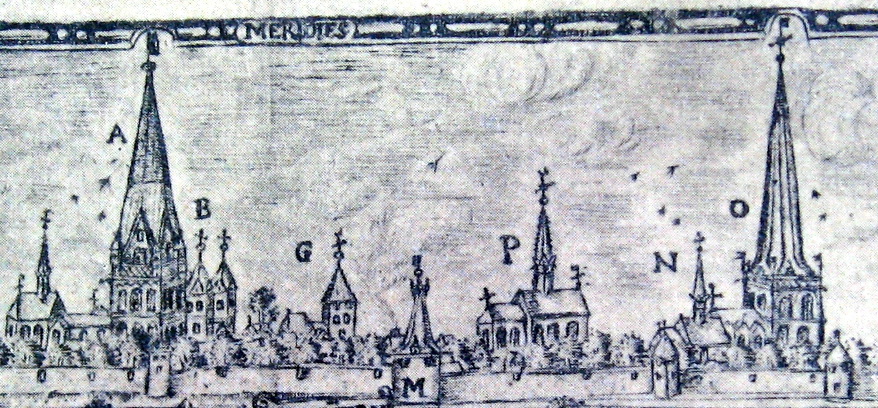 Die Dortmunder Stadtkirchen auf einer Stadtansicht von 1611; A=Reinolditurm; B=Marienkirche; G=alte Nicolaikirche; M=Burgthor; P=Dominikanerkloster (heute Propsteikirche); N=Katharinenkloster; O=Petrikirche